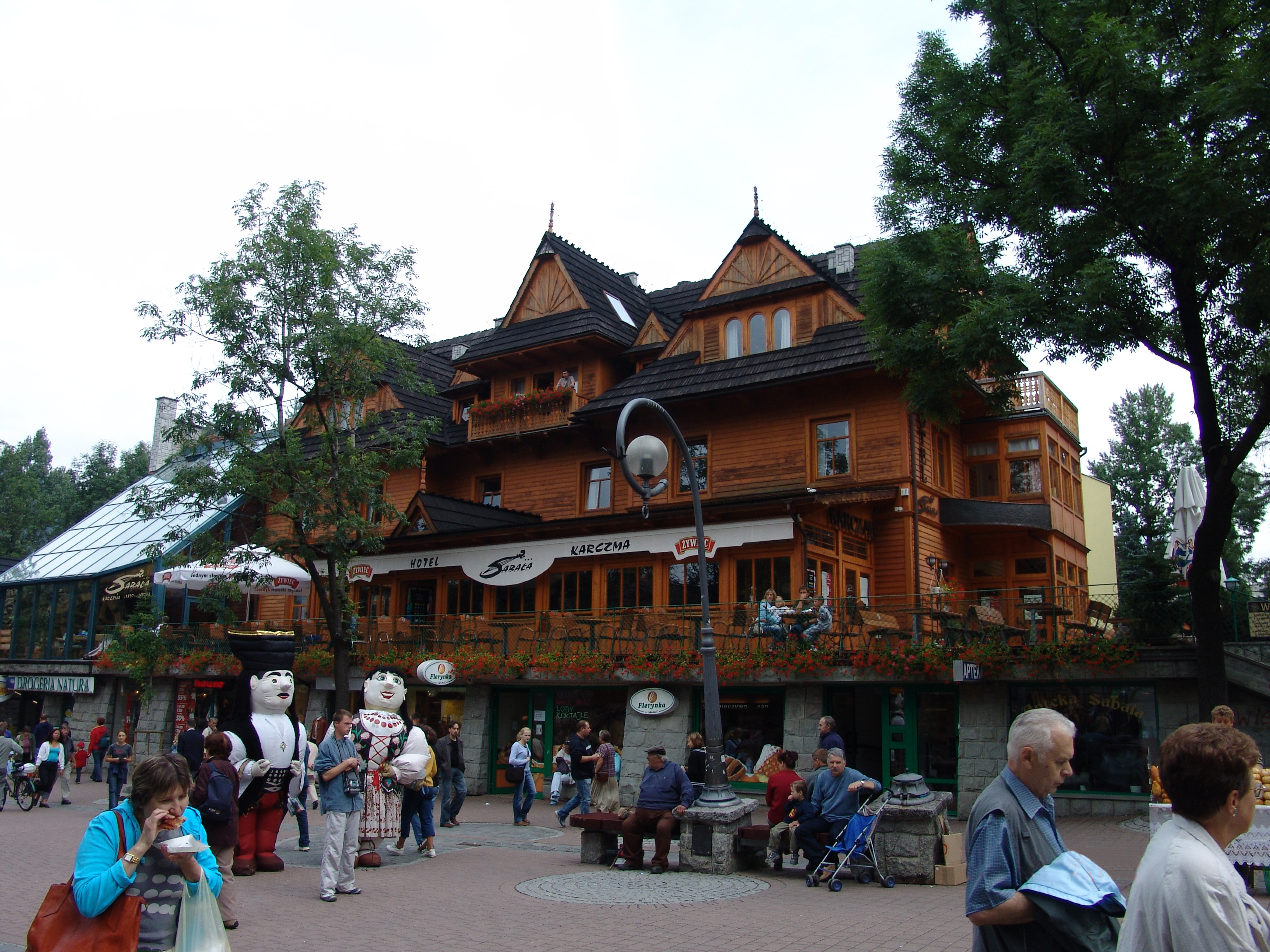 Zakopane, ul. Krupówki 11 - willa drewniana „Staszeczkówka” A typical building in the Krupowki Street in downtown Zakopane